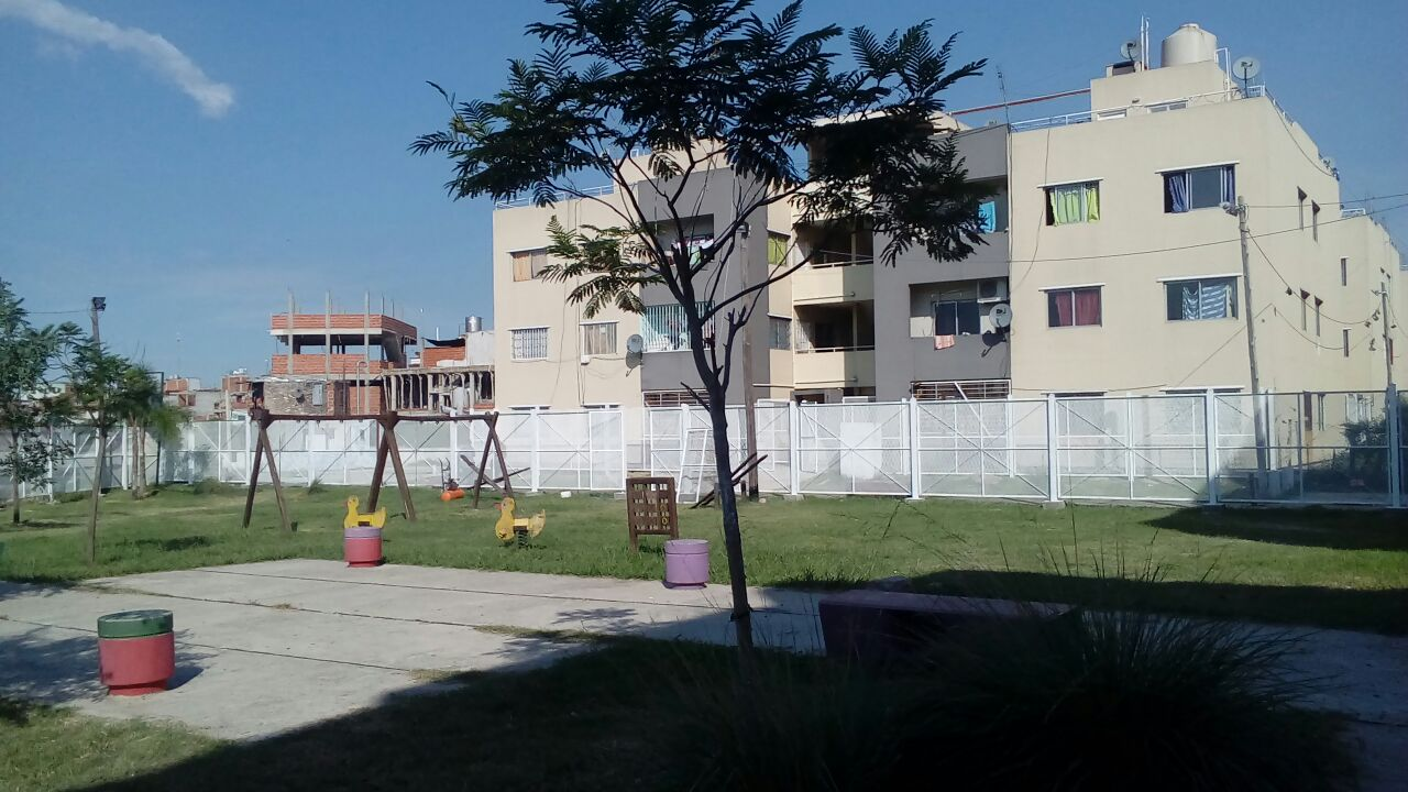 Obras en el barrio Los Piletones, Villa Lugano, Ciudad Autónoma de Buenos Aires.